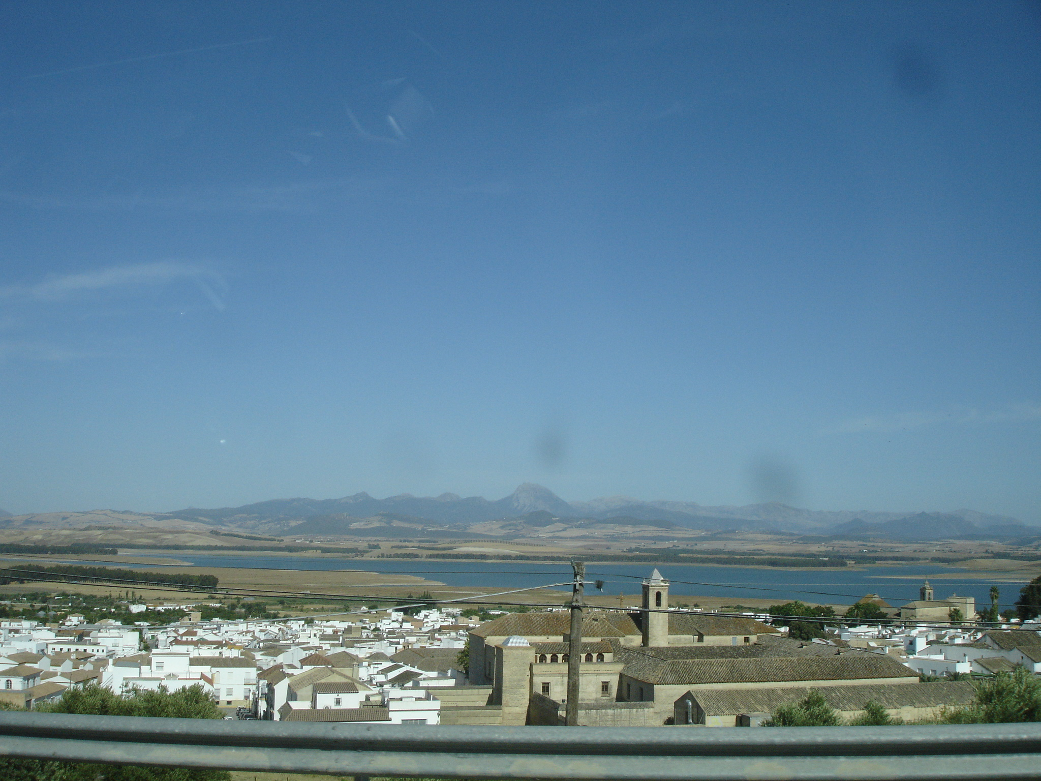 Bornos